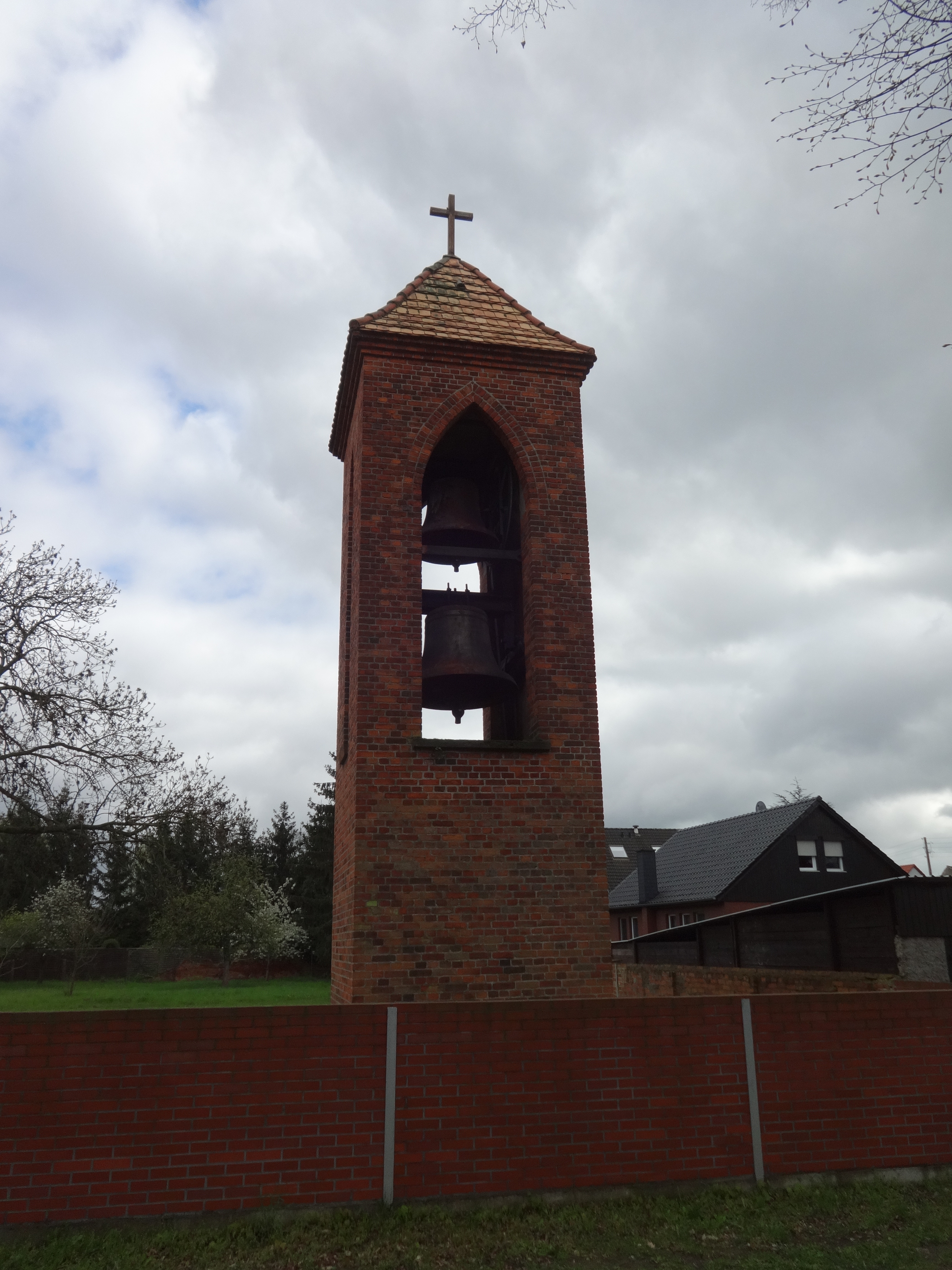 Die Dorfkirche Gorgast gehört zu den ersten in der Zeit der DDR neu errichteten Sakralbauten. Die Ausstattung ist überwiegend neuzeitlich und stammt aus der Bauzeit der Kirche. Das Altarretabel ist aus französischem Bleiglas und hat einen Durchmesser von 1,8 m. Die Fünte stammt aus einem Vorgängerbau, die Orgel aus der Werkstatt von Wilhelm Sauer.